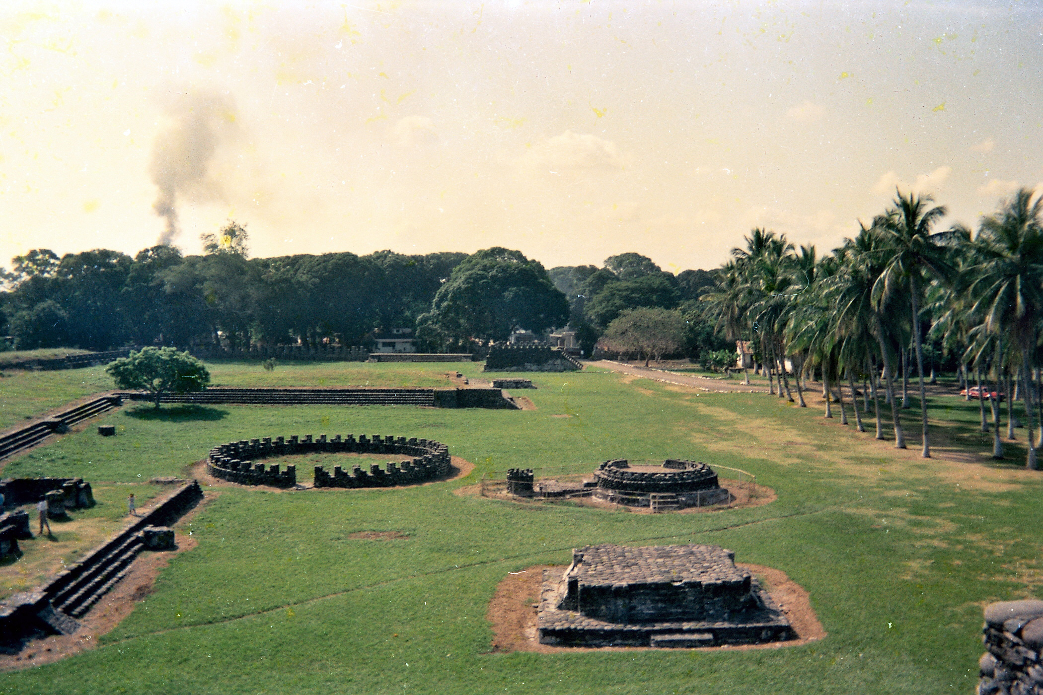 Photo taken in Cempoala, State of Veracruz, Mexico. IMPROVED: This is a digitalize picture from and old picture. Picture should be improved when posible. NOTE: Photo nead to be describe. SPANISH: Foto tomada en Cempoala, Estado de Veracruz, México. MEJORA: Esta imagen se ha digitalizado a partir de un negativo viejo, la foto debe ser mejorada cuando sea posible. SPANISH: Foto tomada en Zempoala, Veracruz, México.